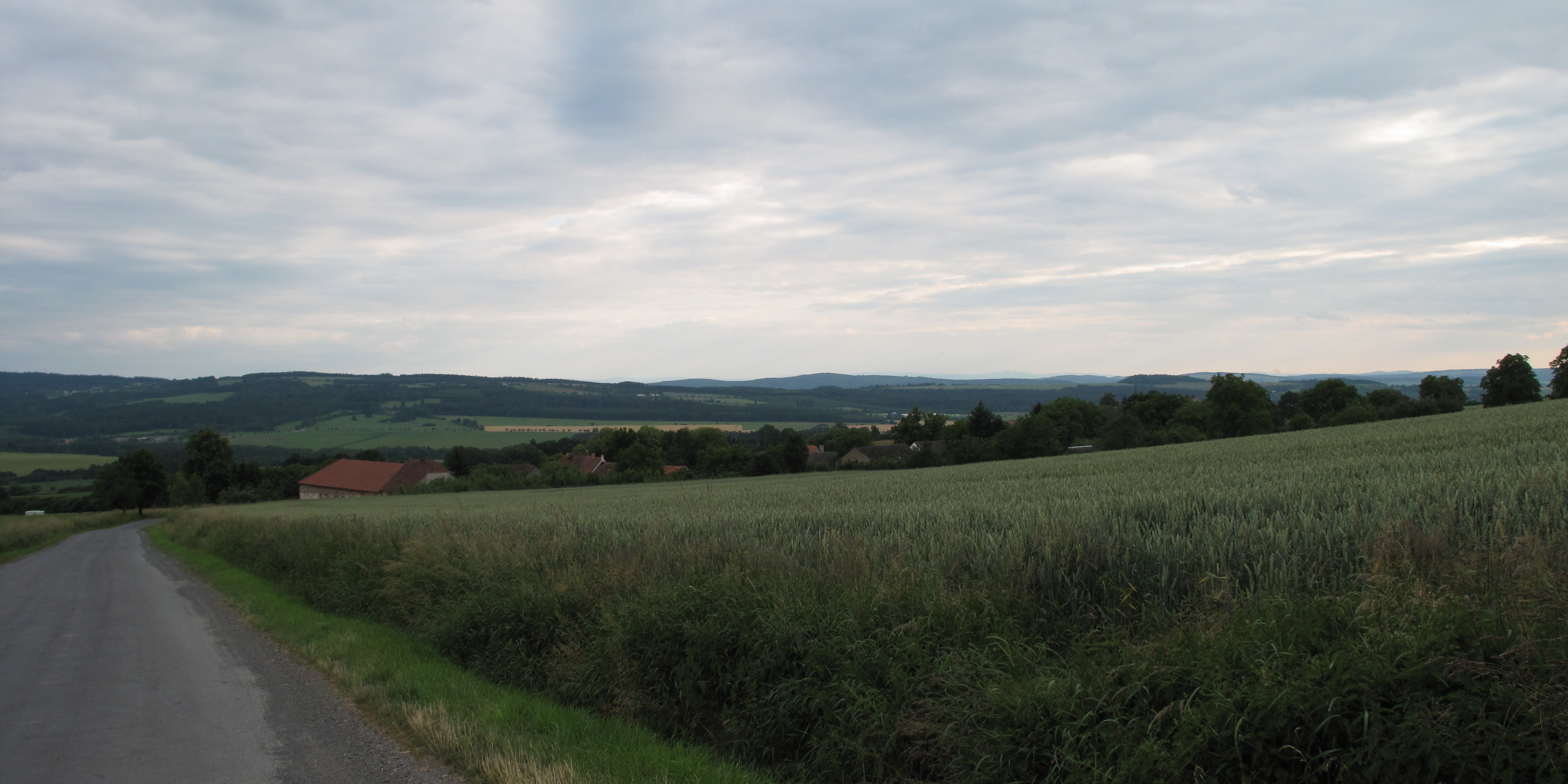 Záluží. Okres Plzeň-jih, Česká republika.